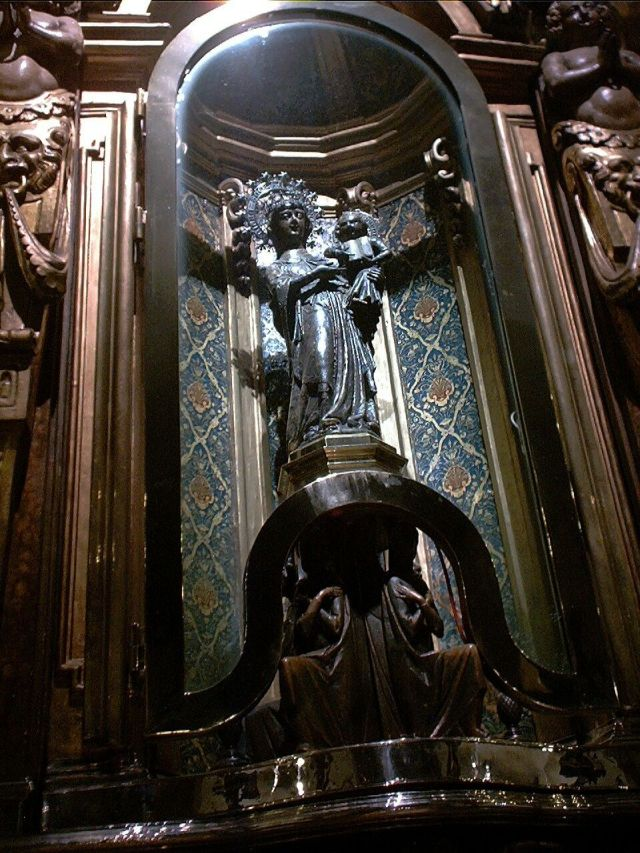 Bild der schwarzen Madonne in Kloster Lluc